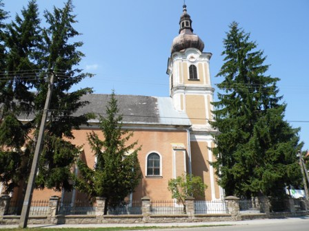 A szendrői római katolikus templom.